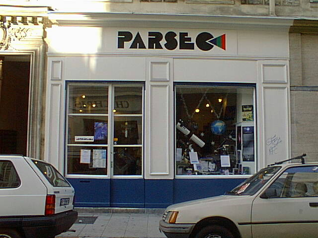 Siège social de PARSEC à Nice, rue Hoche